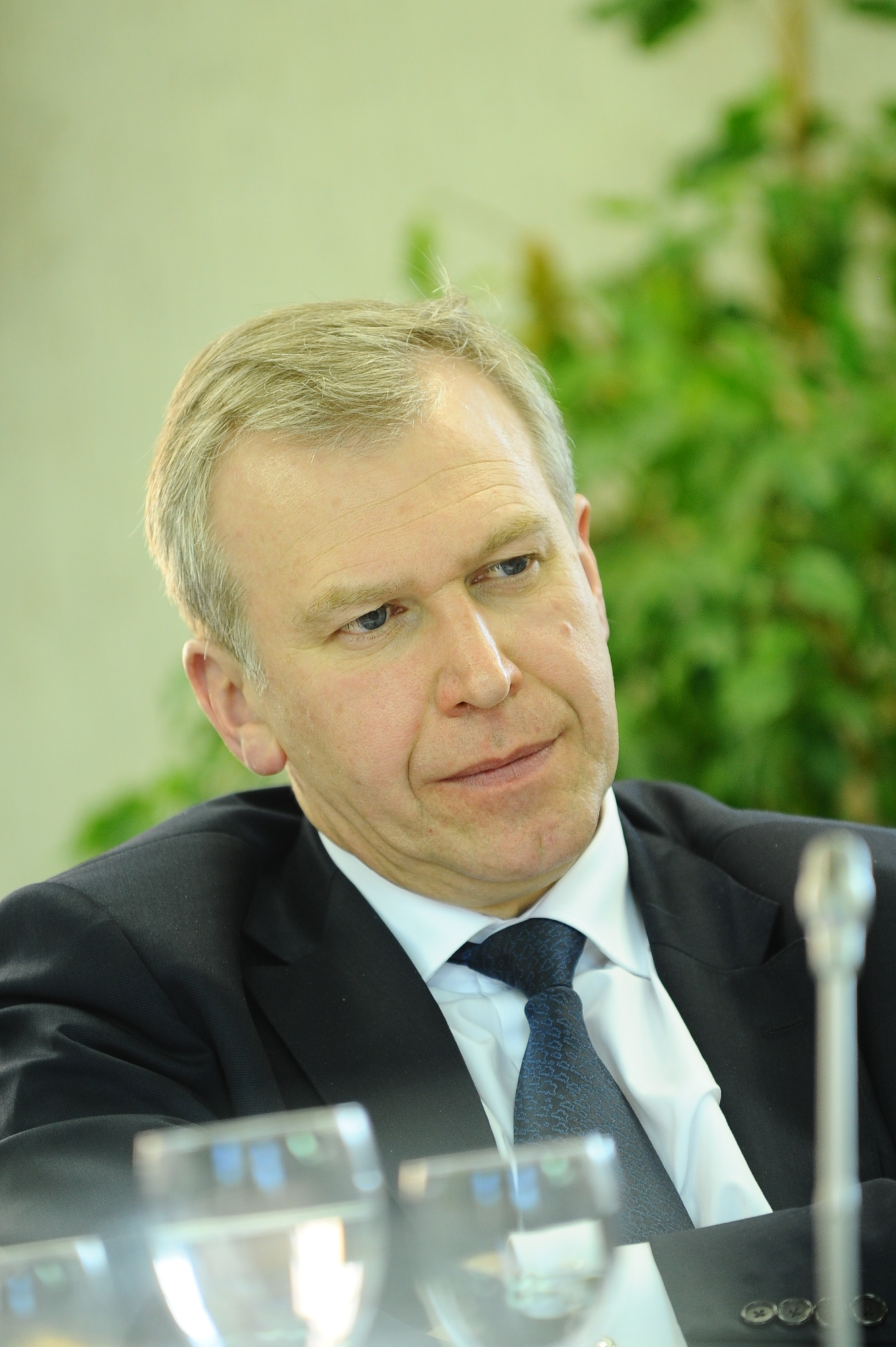 Yves Leterme